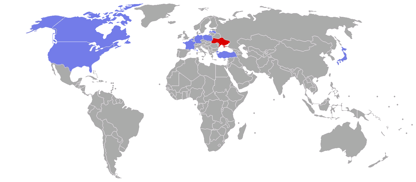 1 визит Украина